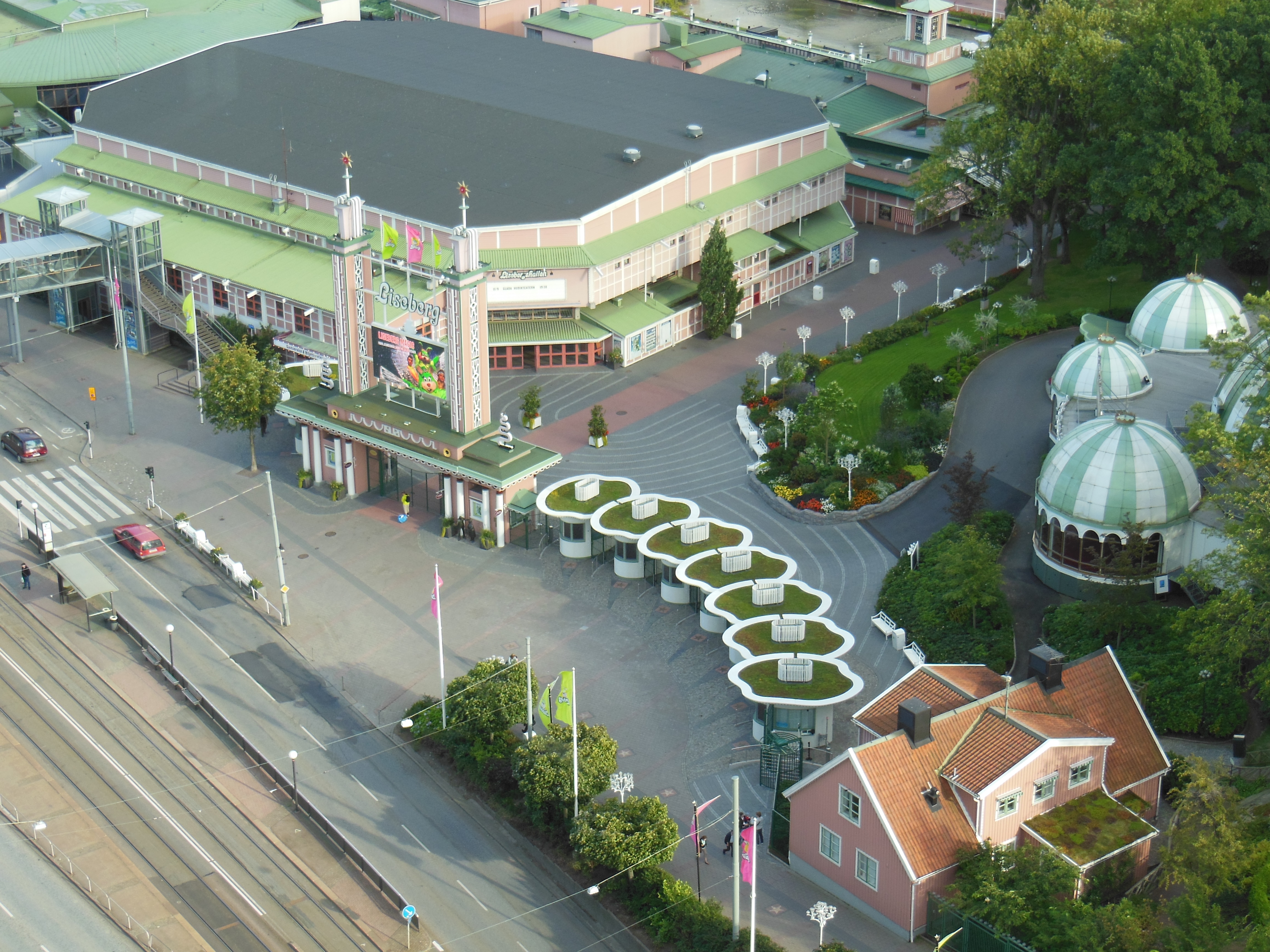 Lisebergs norra entré sedd från Gothia Towers västra torn.